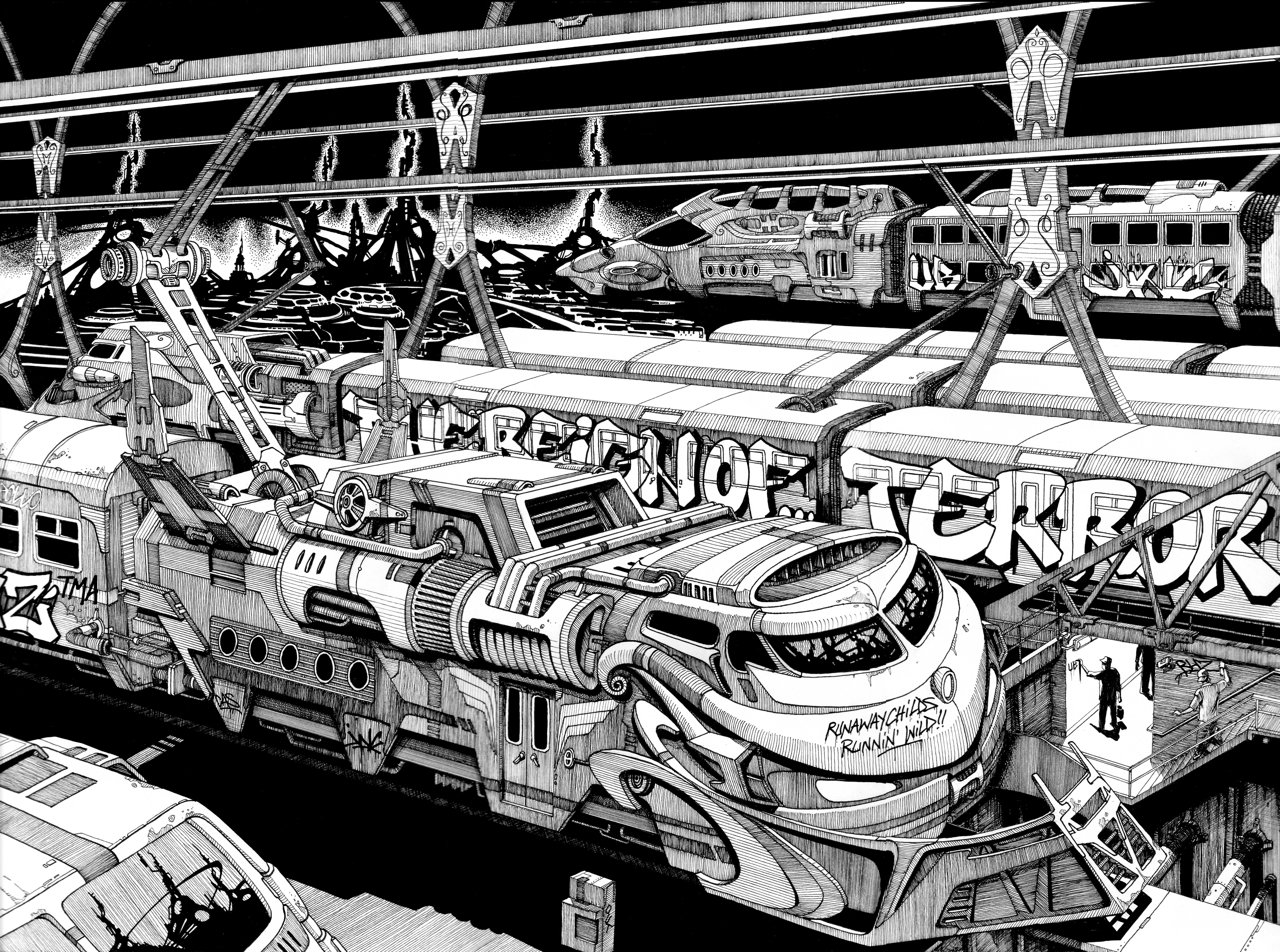 Ink on Paper